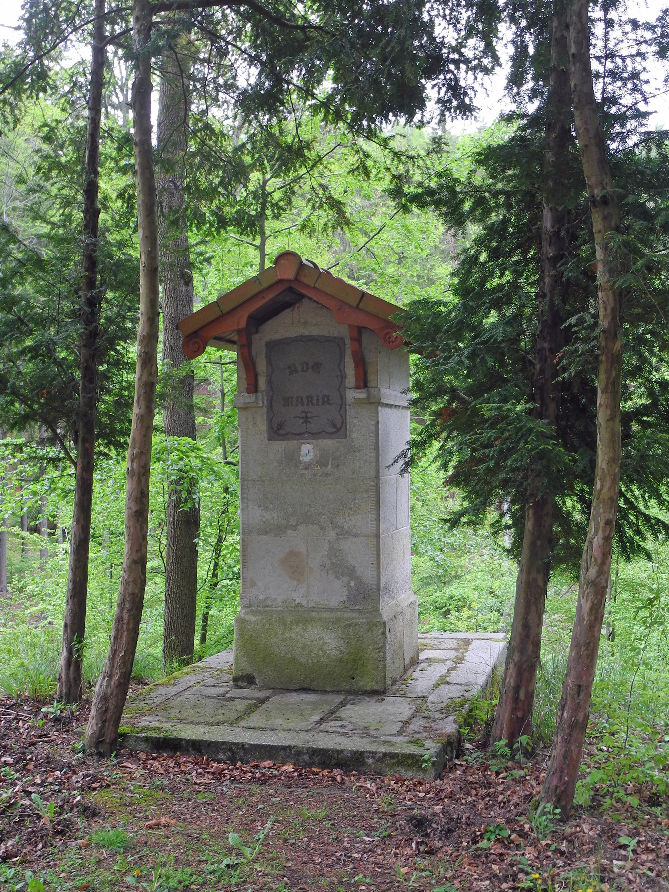 Ave-Maria-Kapelle in Karlsbad (Karlovy Vary)